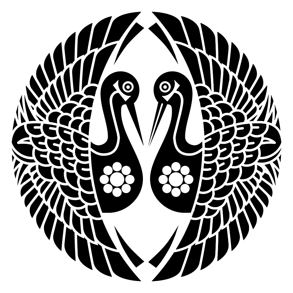 対い鶴に九曜。三戸南部氏の南部鶴と違い、外側の丸が無いのが特徴